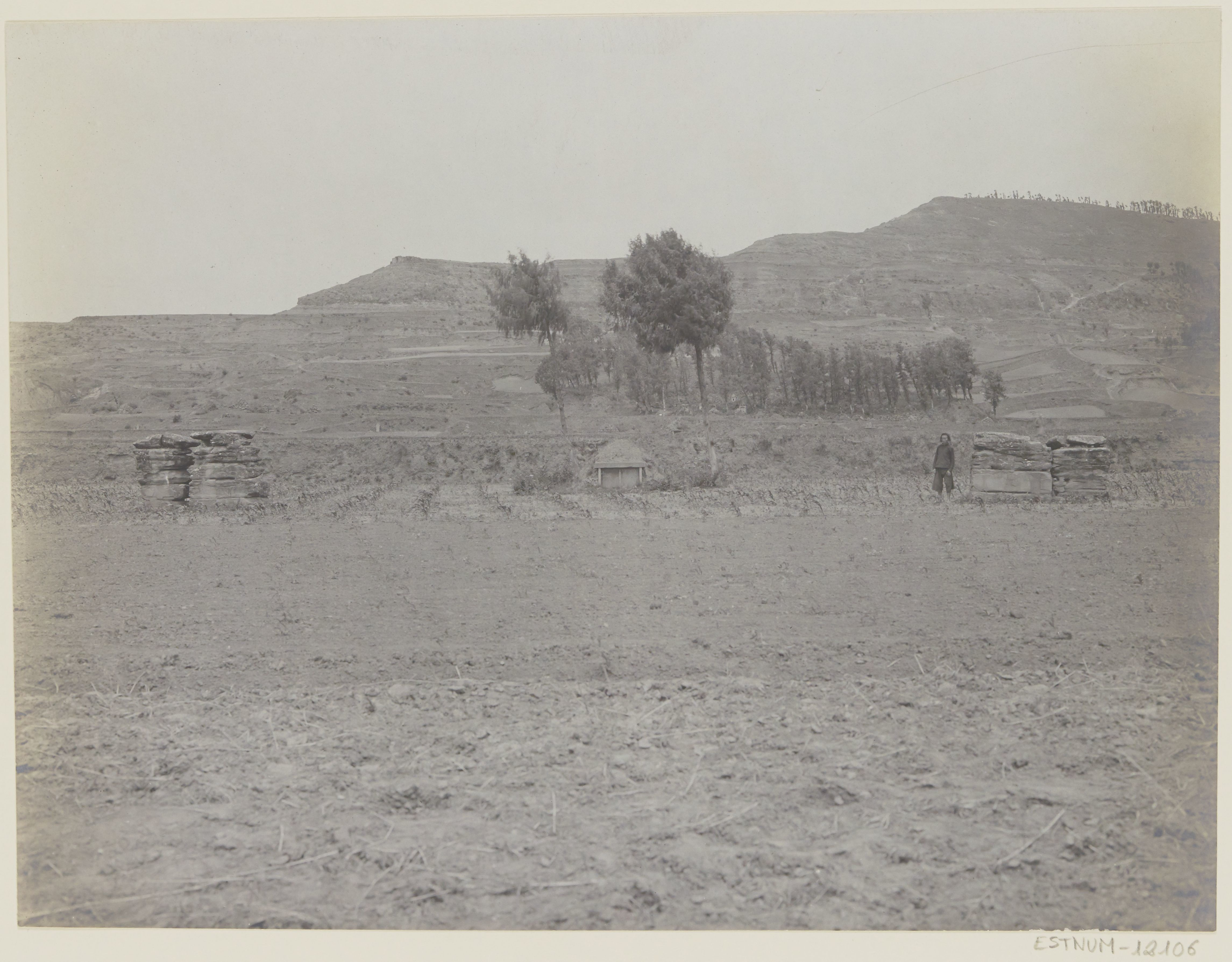 中文（台灣）: 梓潼漢代四闕